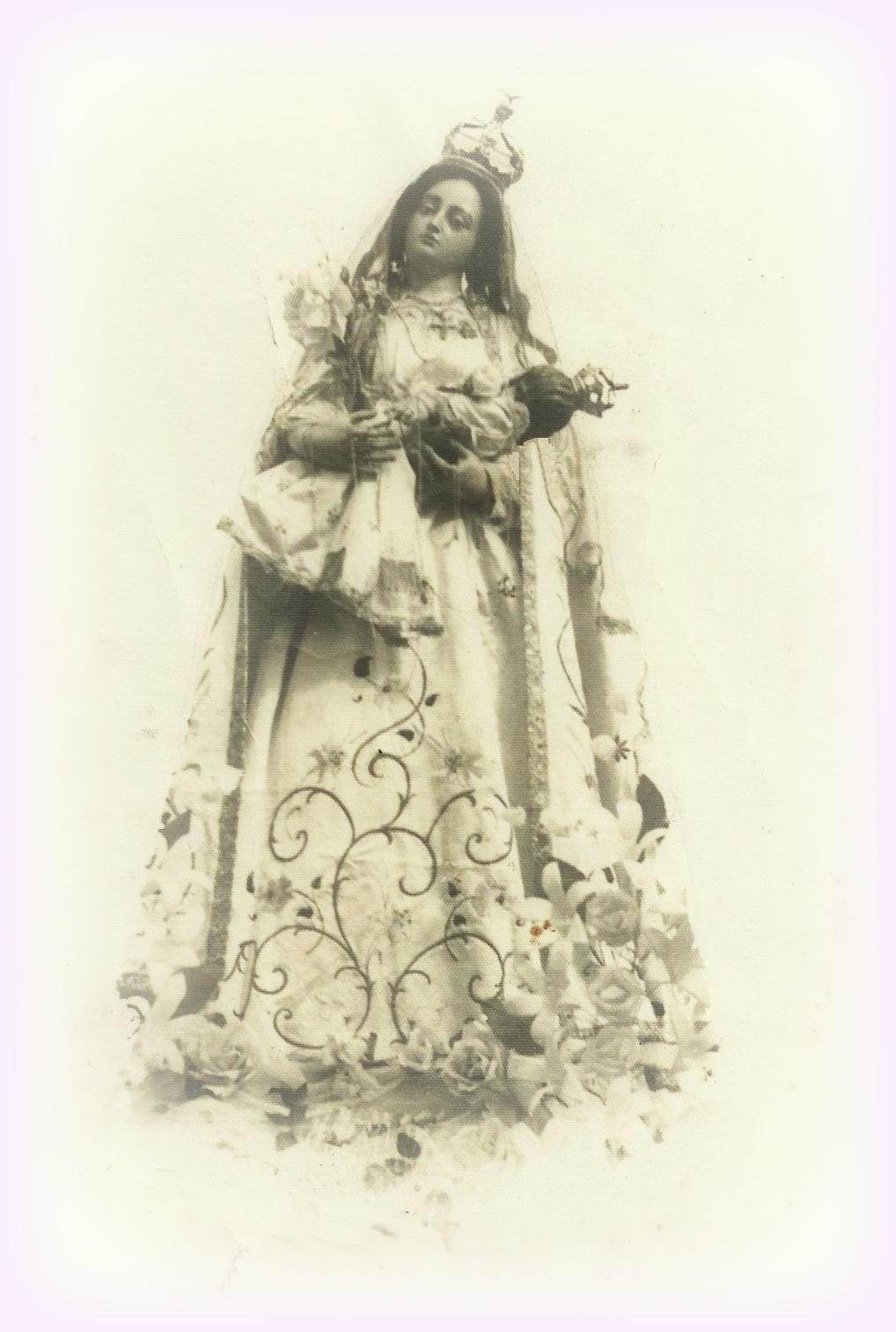 Imagem vestida segundo o gosto dos anos 30/ 40 do séc. XX envergando o seu fato de matiz. Iconograficamente a representação encontra-se completa (Virgem, Menino Jesus e Flores).